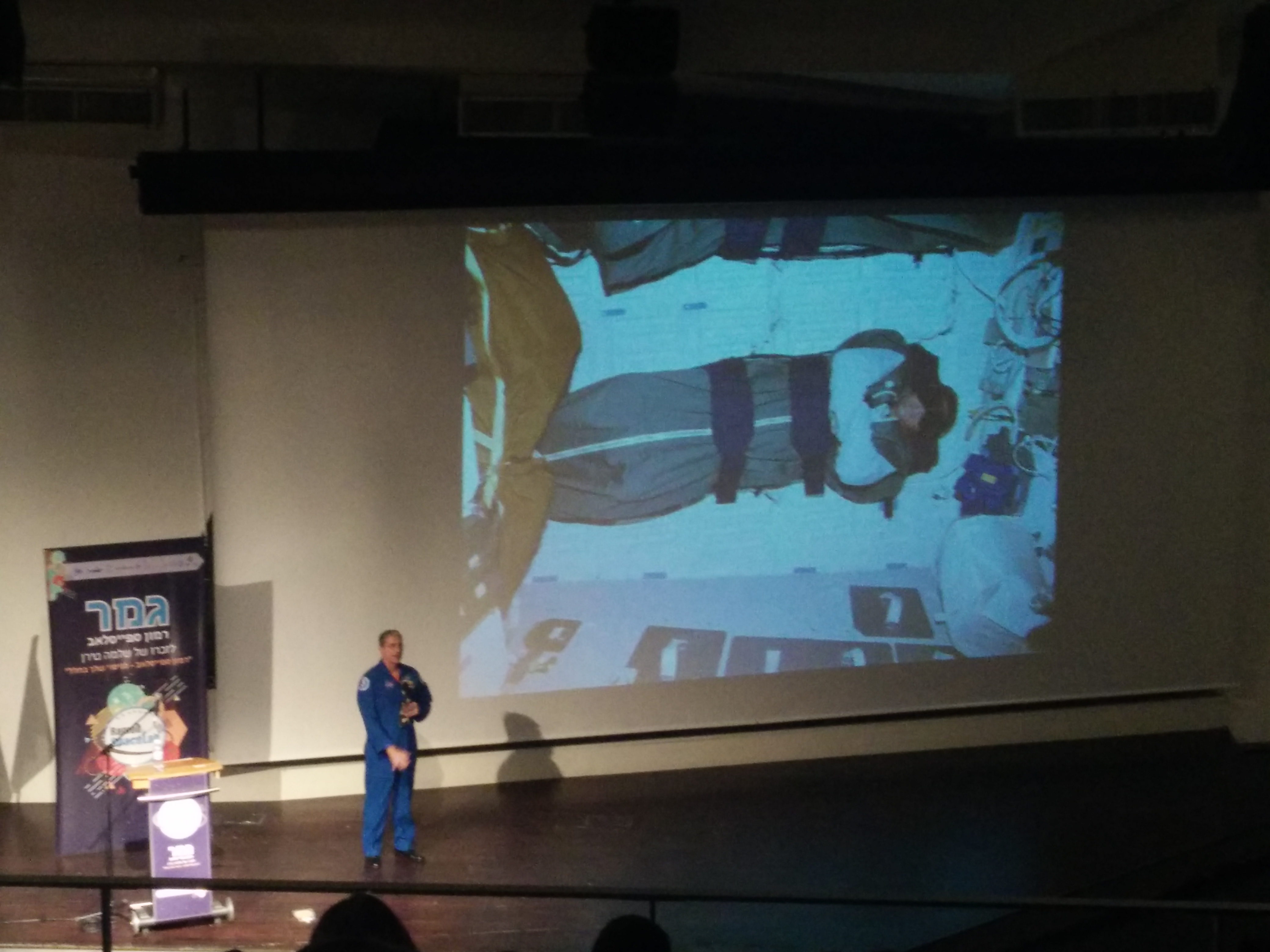 כנס חלל spacelab האסטרונאוט גון תומאס מציג על שינה בחלל